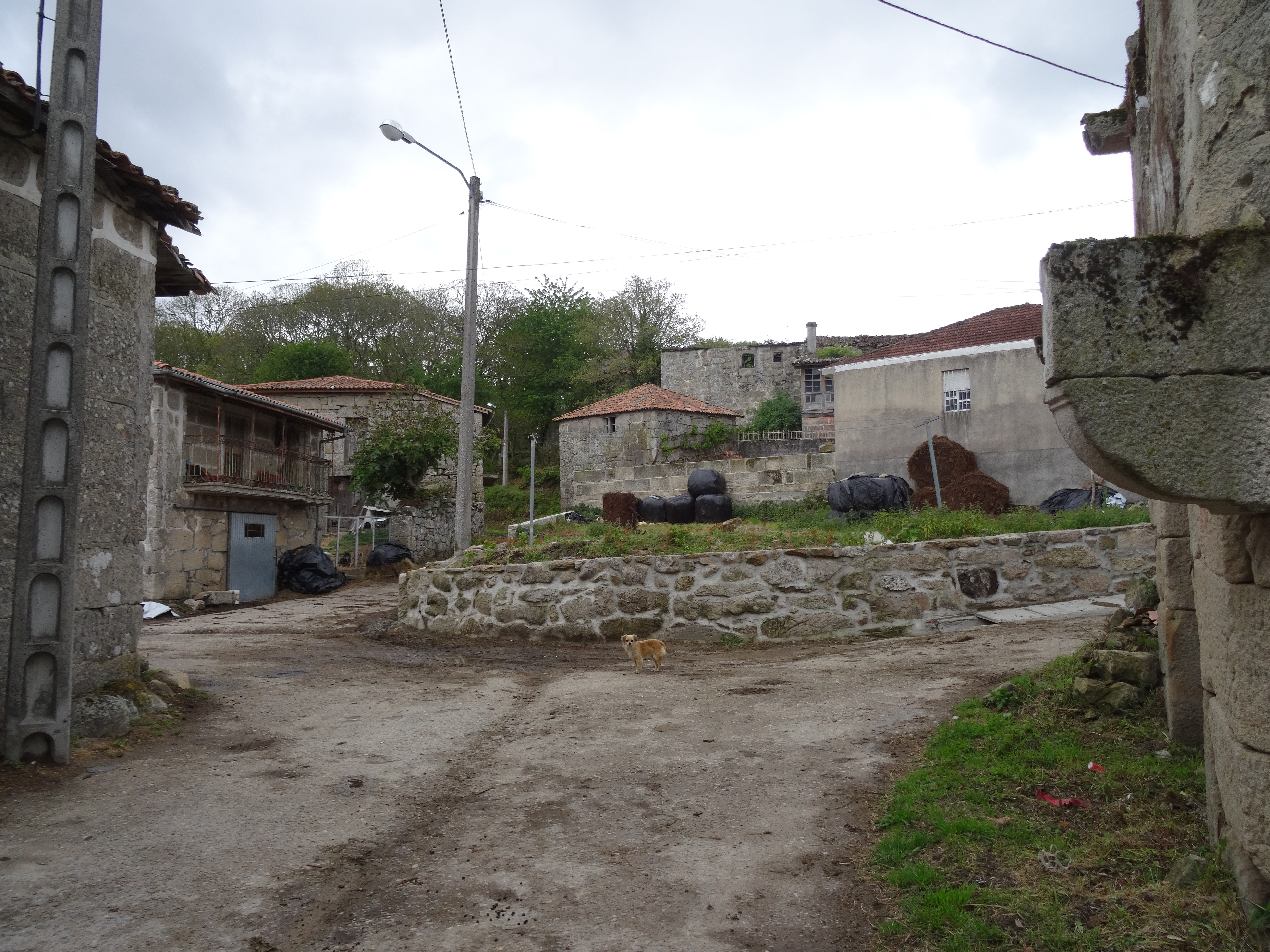 Ver título.